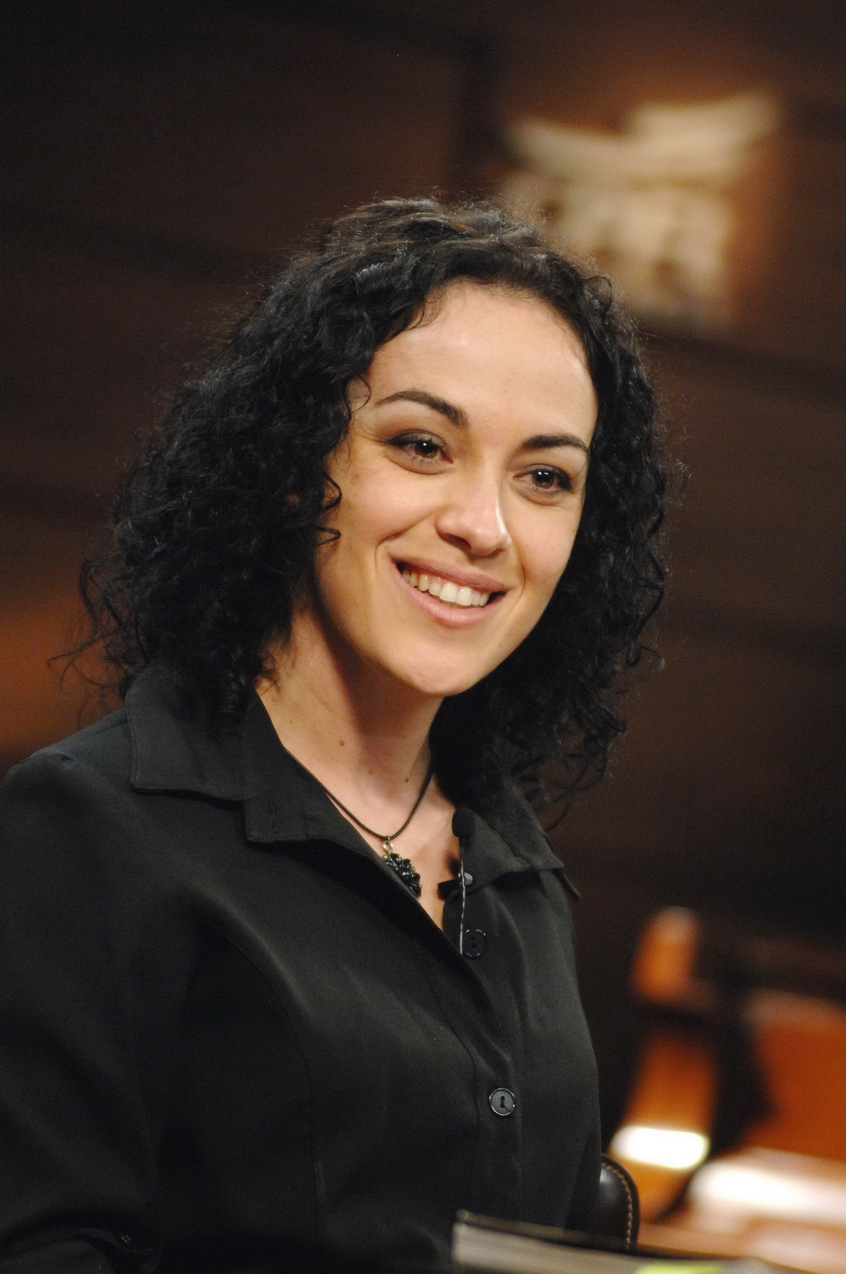 Café Filosófico Café Filosófico